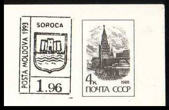 Штемпель-марка города Сороки (Молдавия)